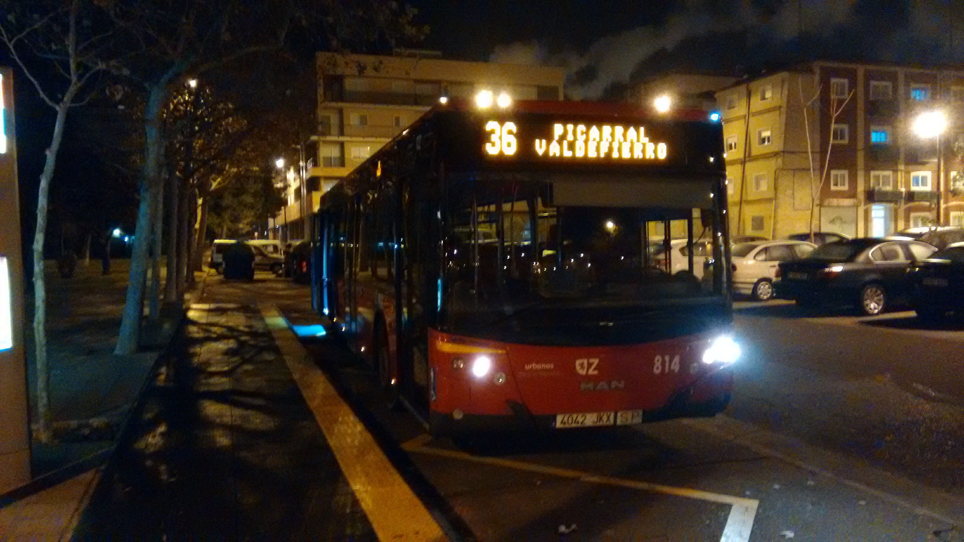 Bus 814 de Auzsa, prestando servicio en la línea 36.